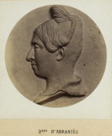 Laure Adélaïde Constance Junot, duchesse d’Abrantès (1784-1738) mémorialiste française, médaillon par David d'Angers, Pierre-Jean (1788-1856) in Les médaillons de David d'Angers réunis et publiés par son fils David d'Angers, Robert (1833-1912). 1867